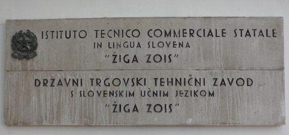 Indicazione di denominazione dell'Istituto Tecnico Commerciale con lingua d'insegnamento slovena Žiga Zois di Trieste